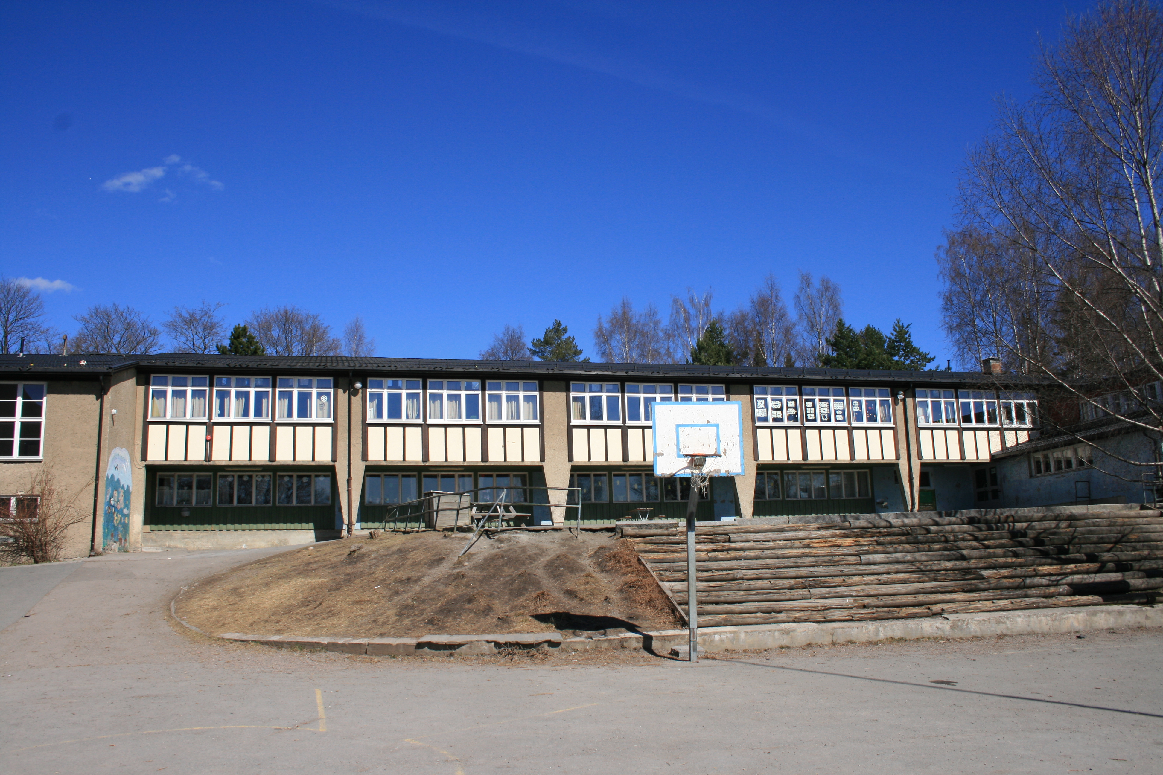 Grefsen school in Oslo.